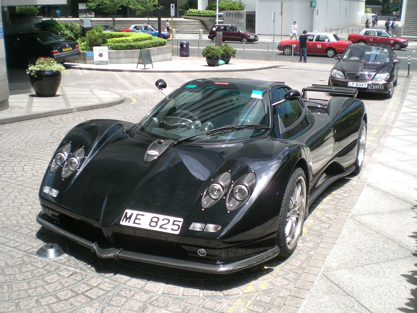 香港君悅酒店, Grand Hyatt Hong Kong, Wan Chai, Hong Kong.